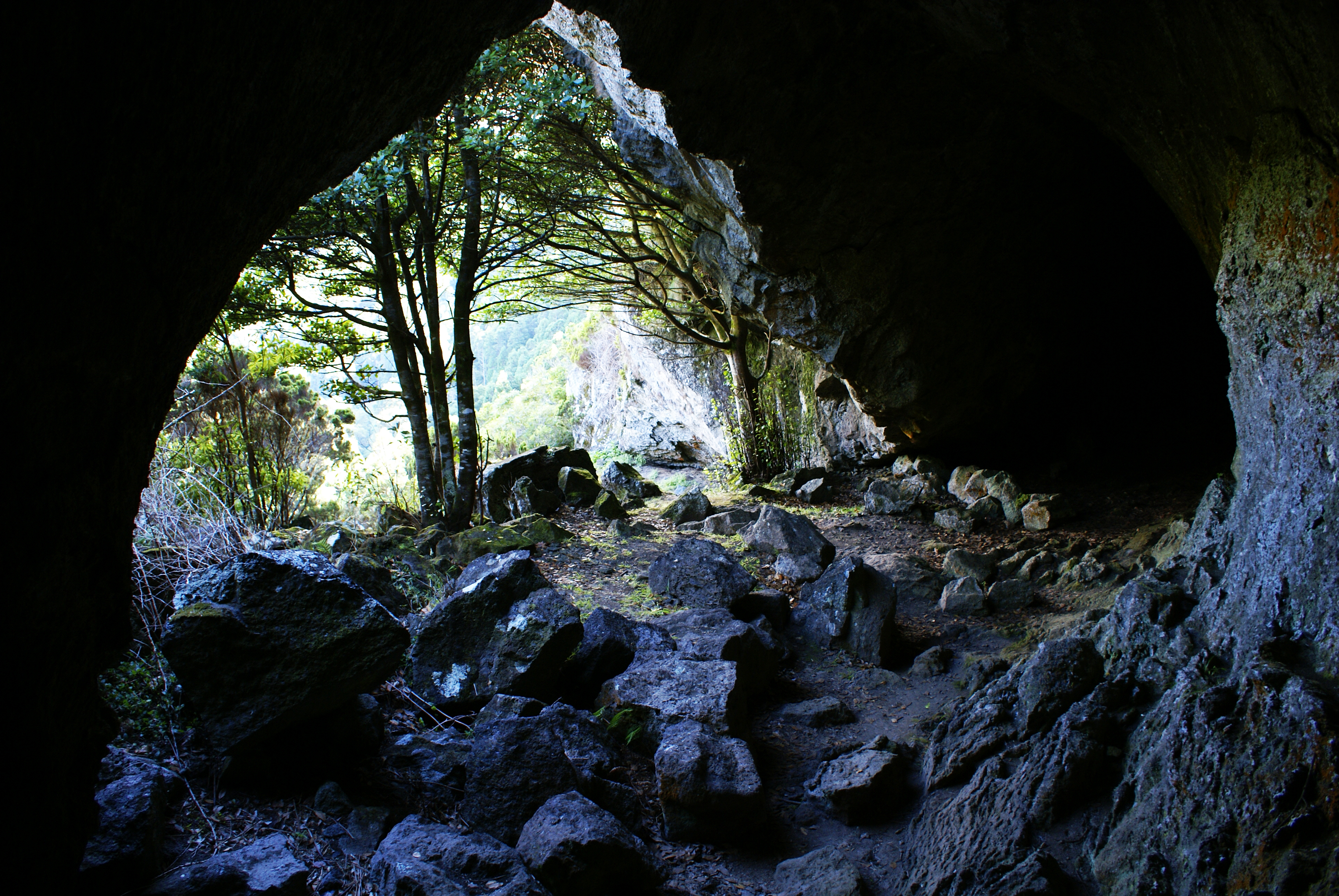 Furna da Maria Encantada, Abatimento do tunel, ilha Graciosa, Açores, Portugal